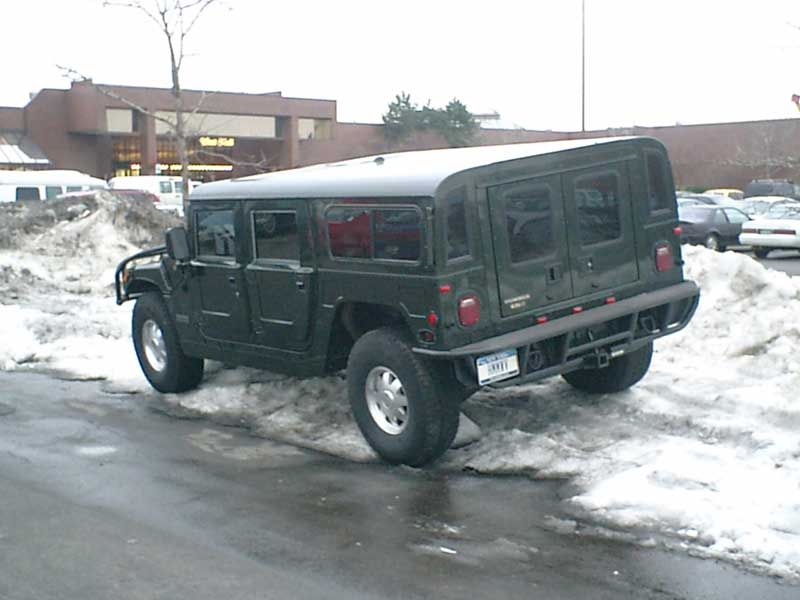 Hummer H1